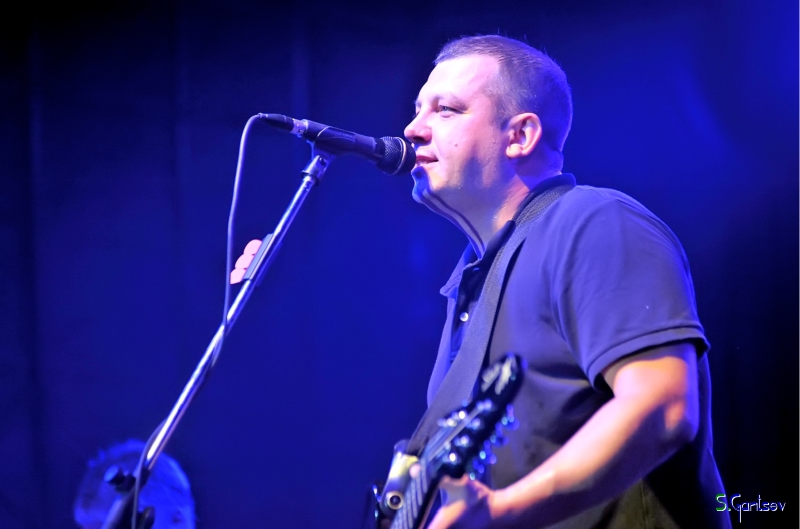 Бобунец Сергей Станиславович. Смысловые галлюцинации